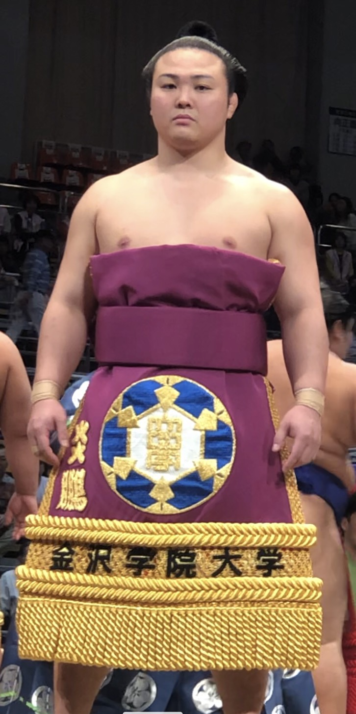 大相撲2018年九州場所初日十両土俵入り炎鵬晃